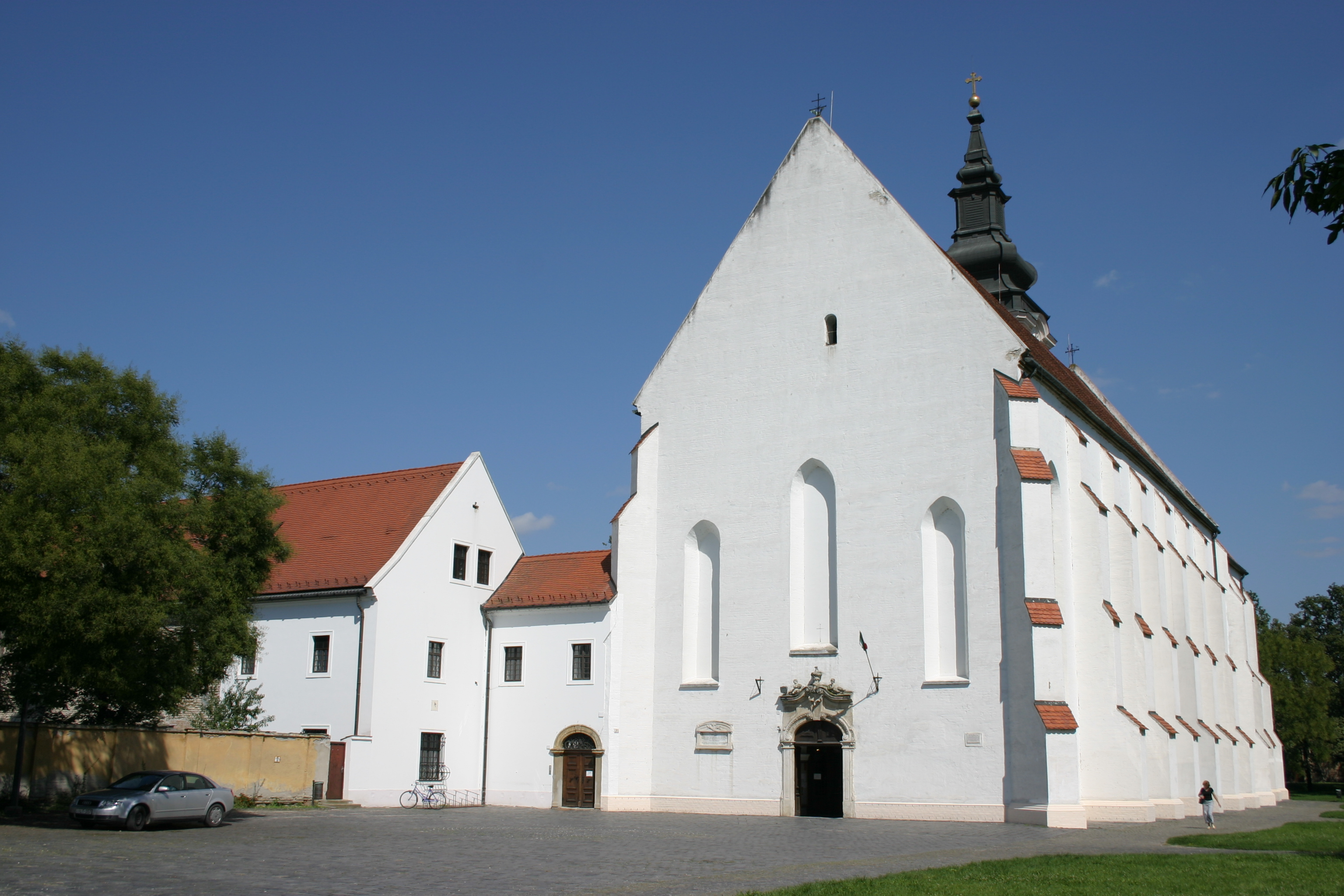 Szeged-Alsóvárosi Havi Boldogasszony templom